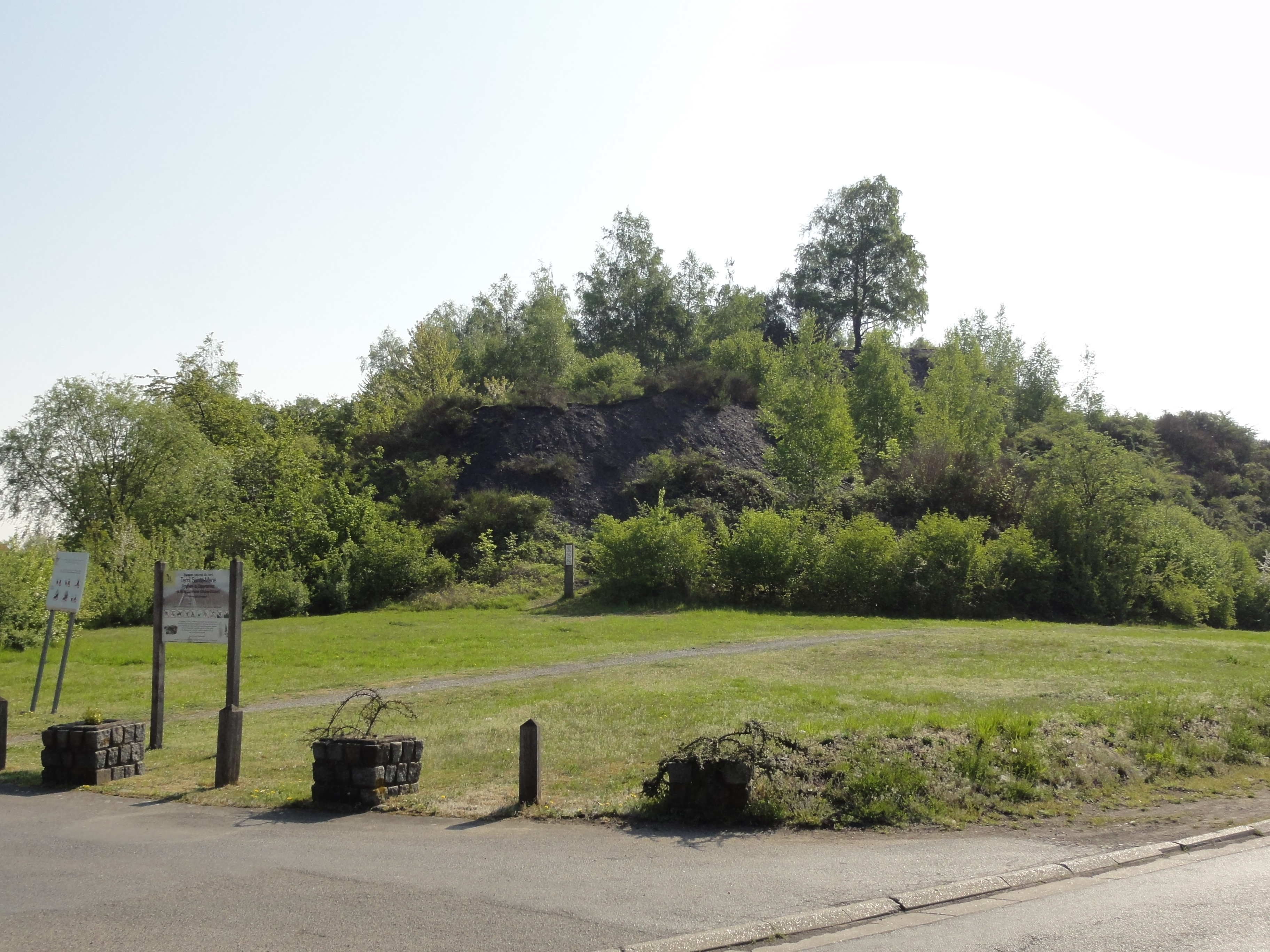 Terril n° 125A dit Sainte Marie Ouest, Fosse Sainte Marie de la Compagnie des mines d'Aniche, Auberchicourt, Nord, Nord-Pas-de-Calais, France.